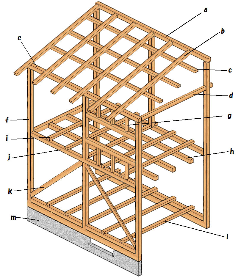 木造軸組構法。a:棟木 垂木 母屋 梁 e:軒桁 f:通し柱 g:楣（まぐさ） h:床梁 i:つなぎ梁 j:胴差 k:筋交い l:根太 基礎